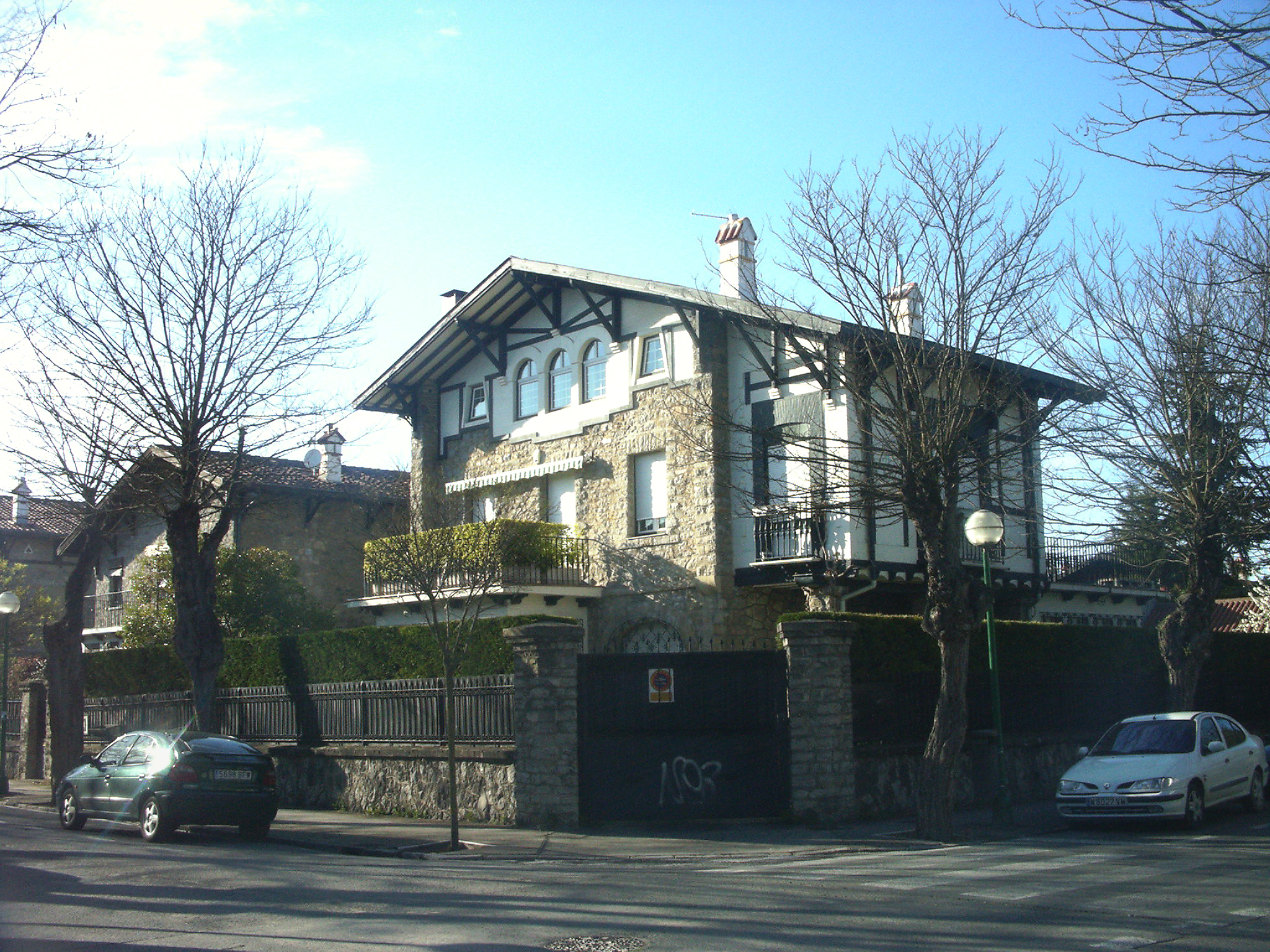 Gasteizko lorategi-hiriaren ikuspegia.